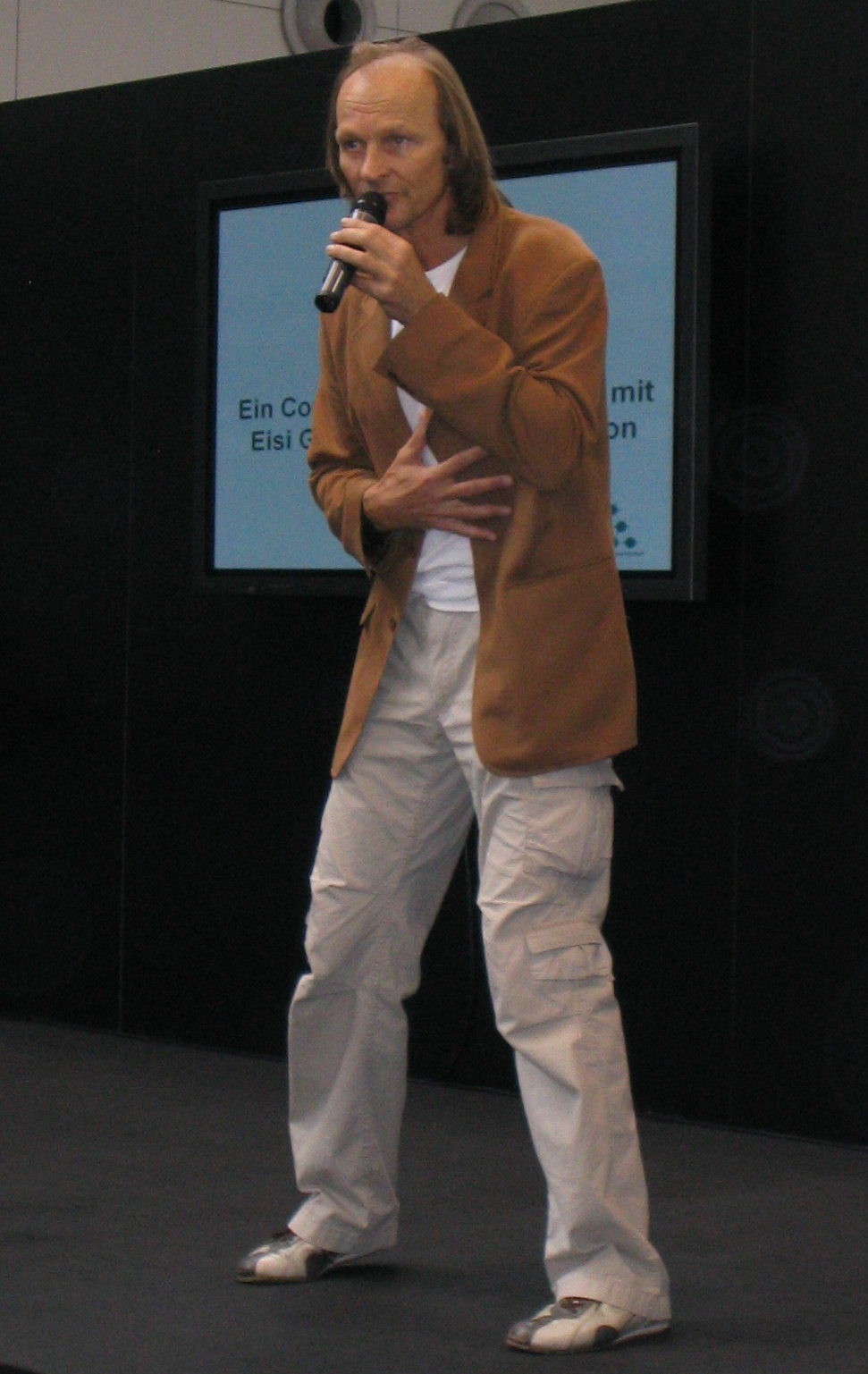 Eisi Gulp auf der didacta 2008